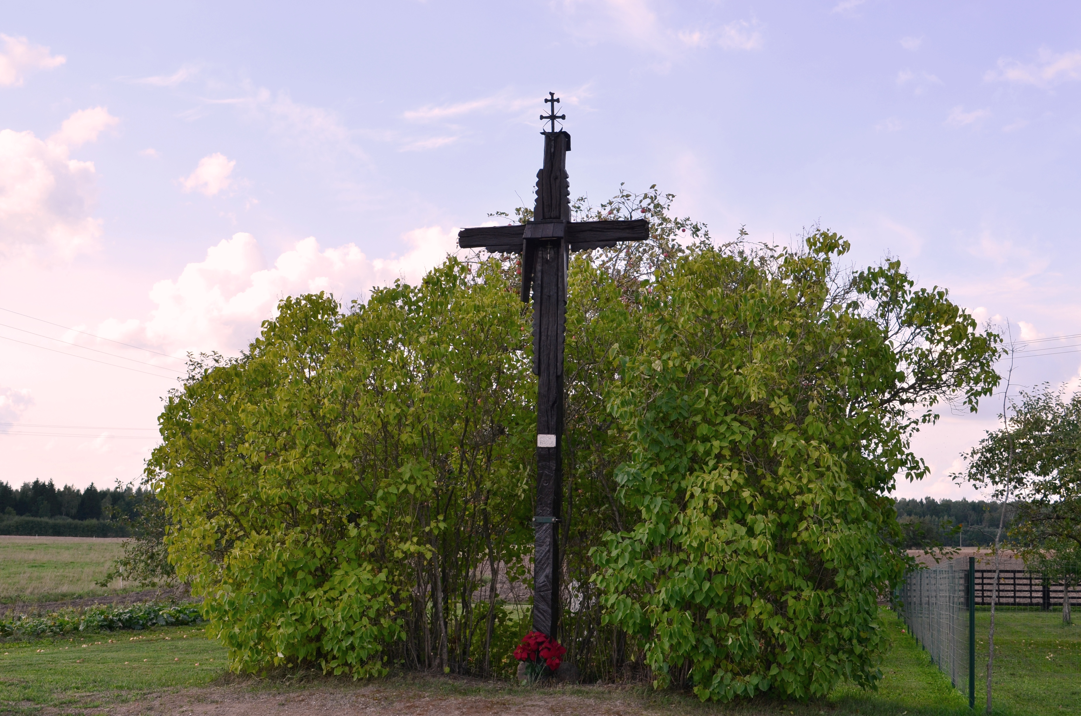 Legečiai, Radviliškio raj.